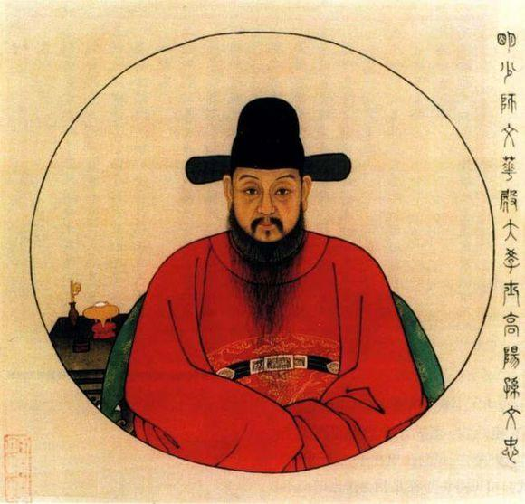 孫承宗（1563年－1638年），字稚繩，號愷陽，諡文忠，清朝諡忠定，北直隸高陽縣南街村（今屬河北省）人。明朝東林黨政治人物、軍事人物，後與清戰鬥，殉國。